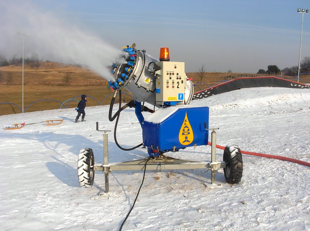 Armatka śnieżna na stoku w Leśnym Parku Kultury i Wypoczynku w Myślęcinku (Bydgoszczy)